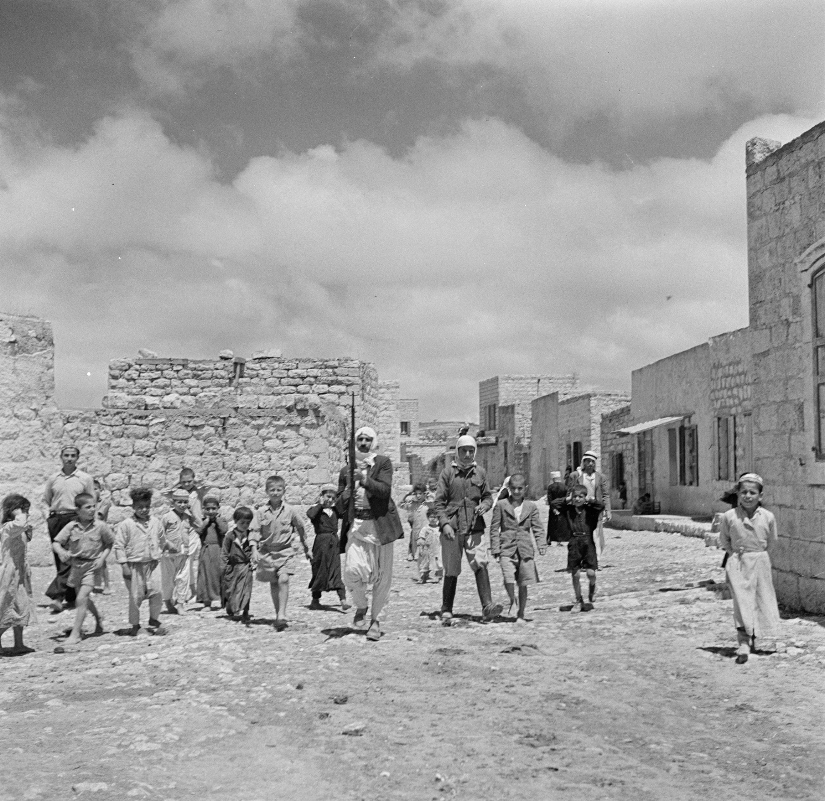 Collectie / Archief : Fotocollectie Van de Poll Reportage / Serie : Israël 1948-1949: Druzendorp Daliyat el Karmel Beschrijving : Druzische man schiet met een geweer in de lucht, terwijl kinderen hun oren dichthouden Datum : 1948 Locatie : Daliyat el Karmel, Israël Trefwoorden : dorpen, dorpsbeelden, kinderen, schieten, vuurwapens Fotograaf : Poll, Willem van de Auteursrechthebbende : Nationaal Archief Materiaalsoort : Negatief (zwart/wit) Nummer archiefinventaris : bekijk toegang 2.24.14.02 Bestanddeelnummer : 255-0064